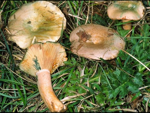 Standortfoto